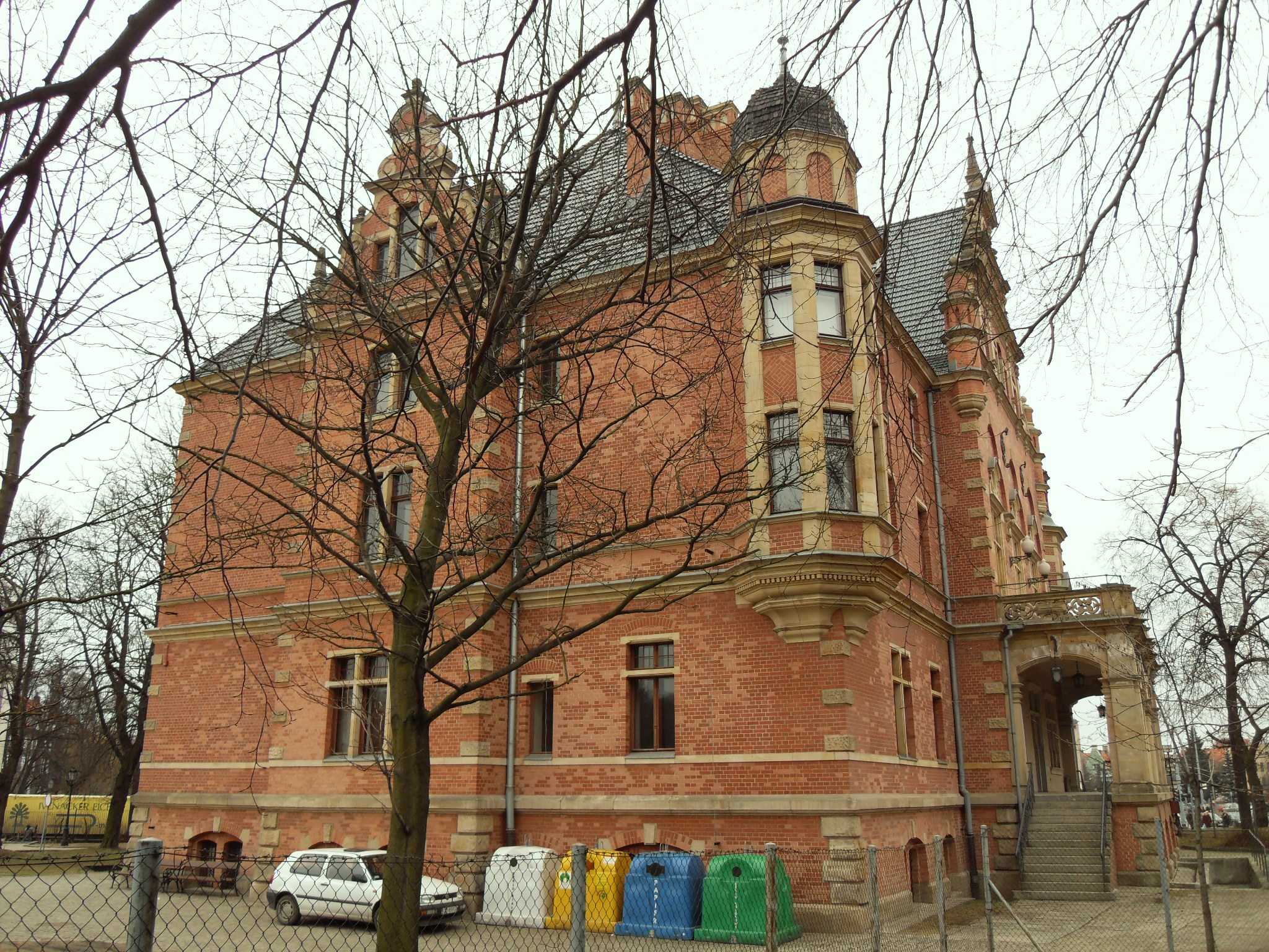 Nowy Ratusz w Gdańsku - fasada zachodnia.